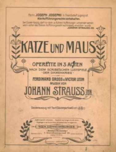 Johann Eduard Strauss Komponist (1866-1939) Partitur zur Operette "Katze und Maus (1898)